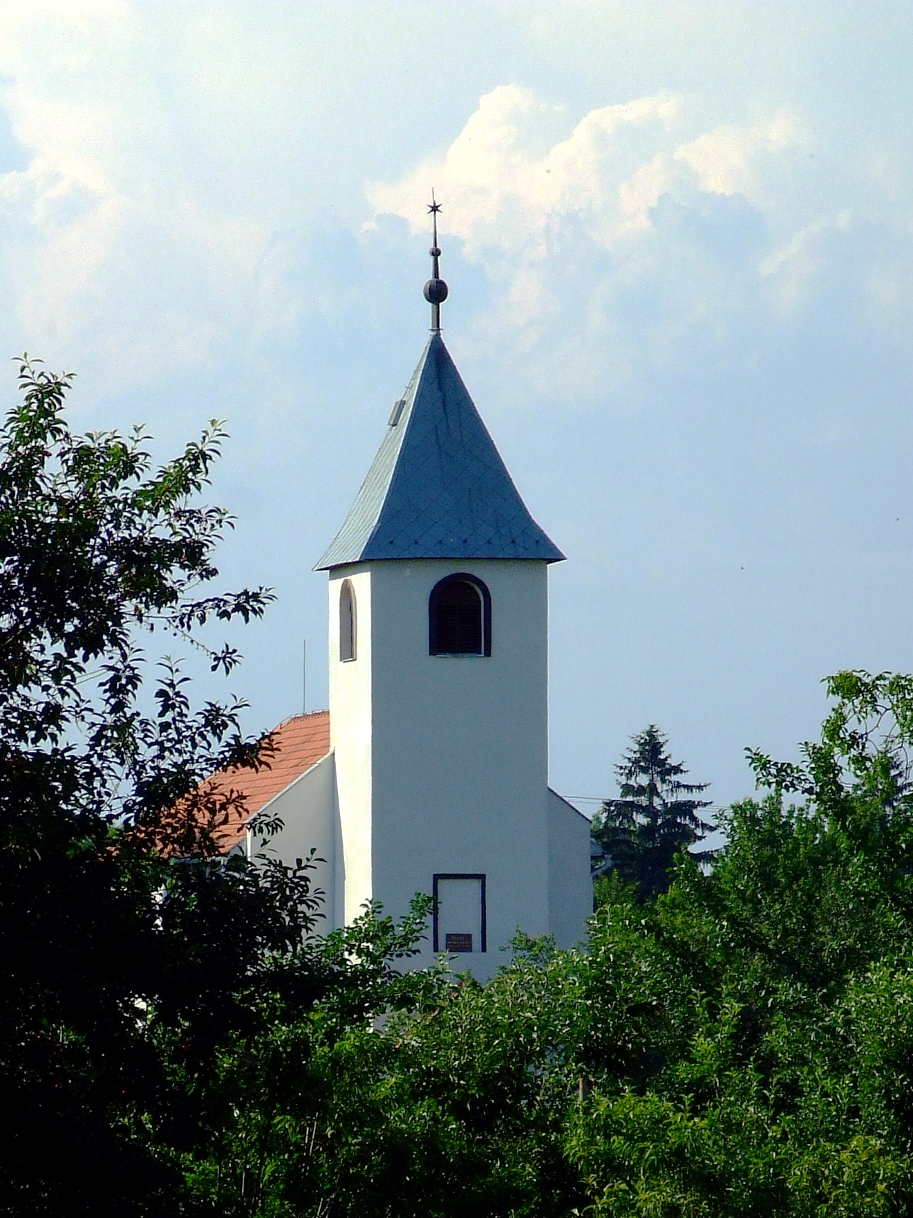 Kostol v obci Tekovský Hrádok